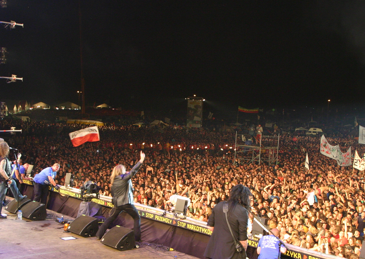 Zespół Helloween na dużej scenie na Przystanku Woodstock w 2011 r.